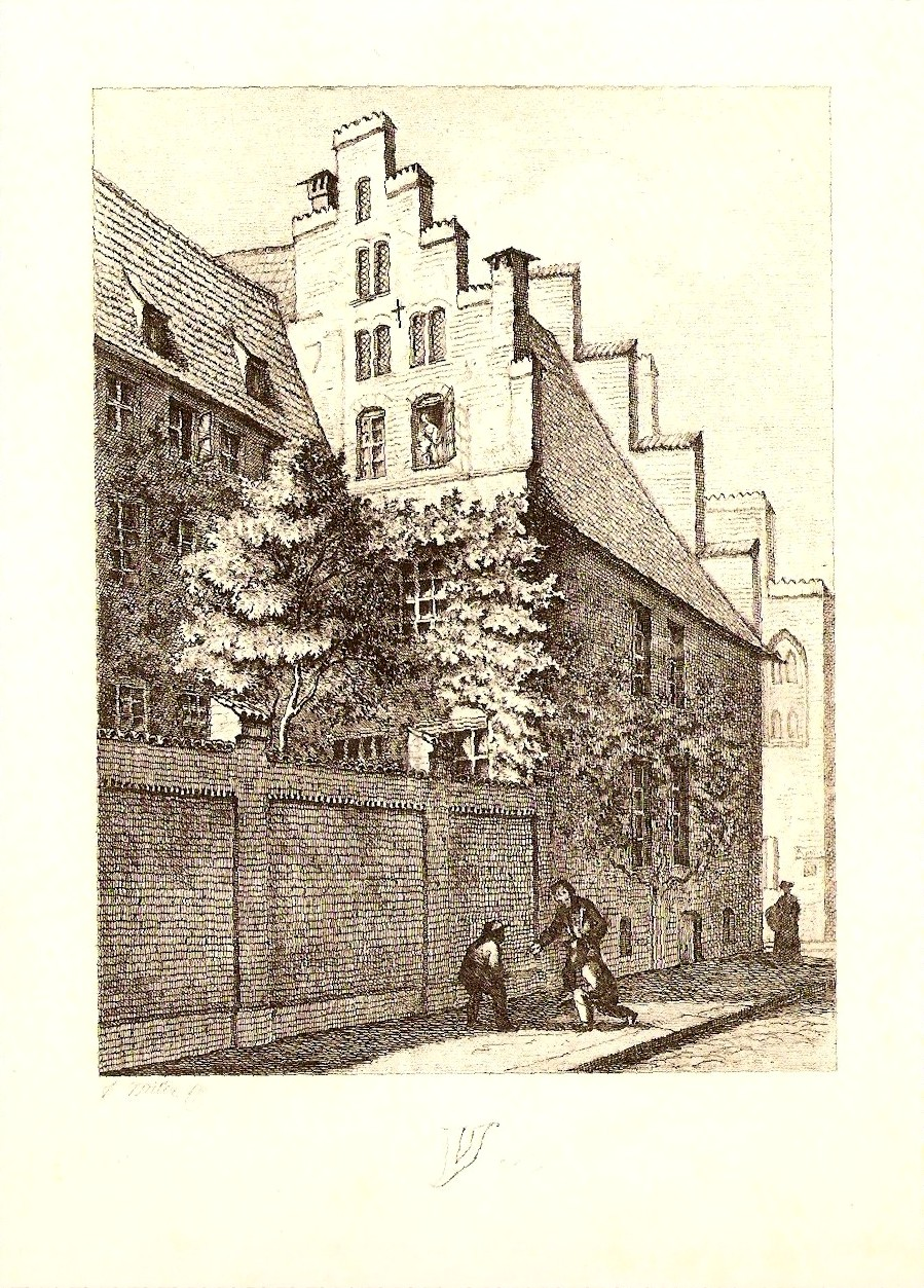 Ygrec, Der Zeichner hat sich hinter dem Fenster seiner Etage verewigt. Anmerkungen: gestorben 1875